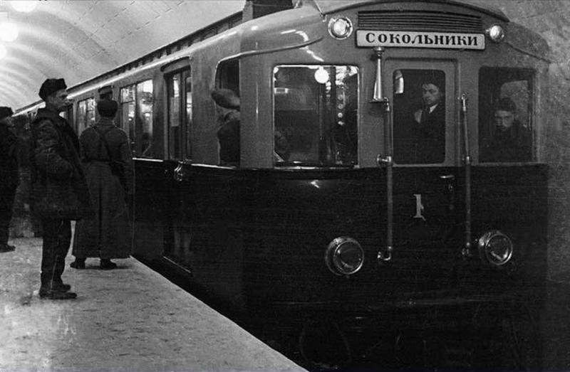 Электропоезд типа А (вагон 1) на станции Охотный Ряд Московского метрополитена